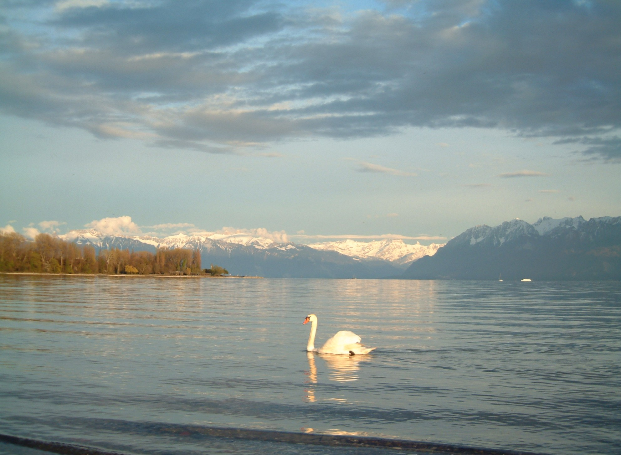 Lac Leman